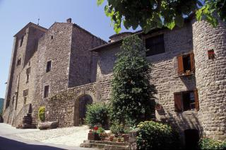 château du 14 ème siècle